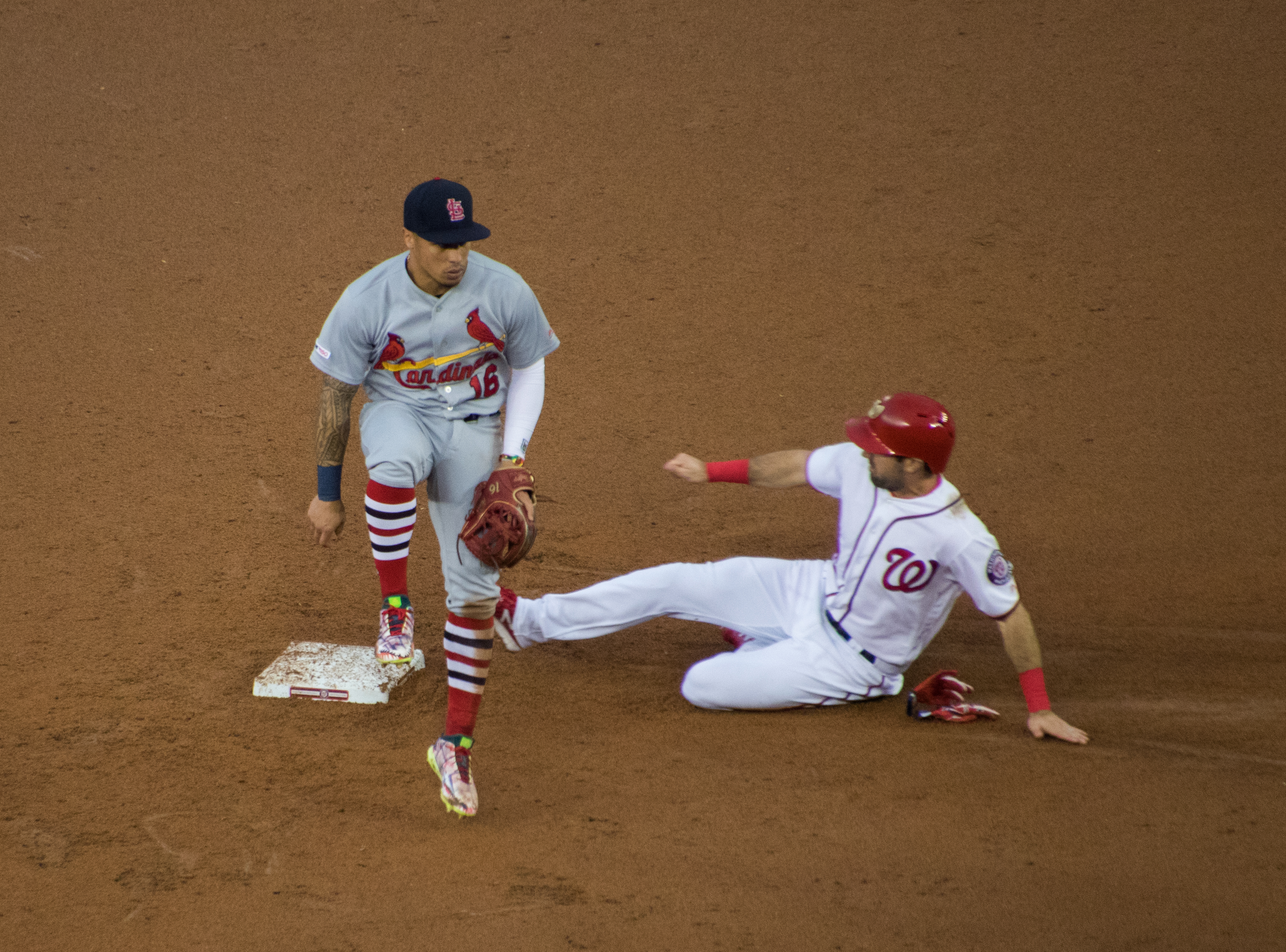 Kolten Wong and Yan Gomes